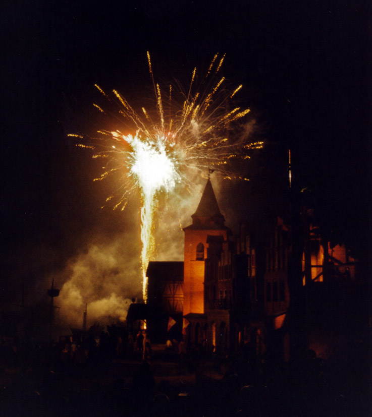 Beschreibung: Störtebeker-Festspiele / Feuerwerk